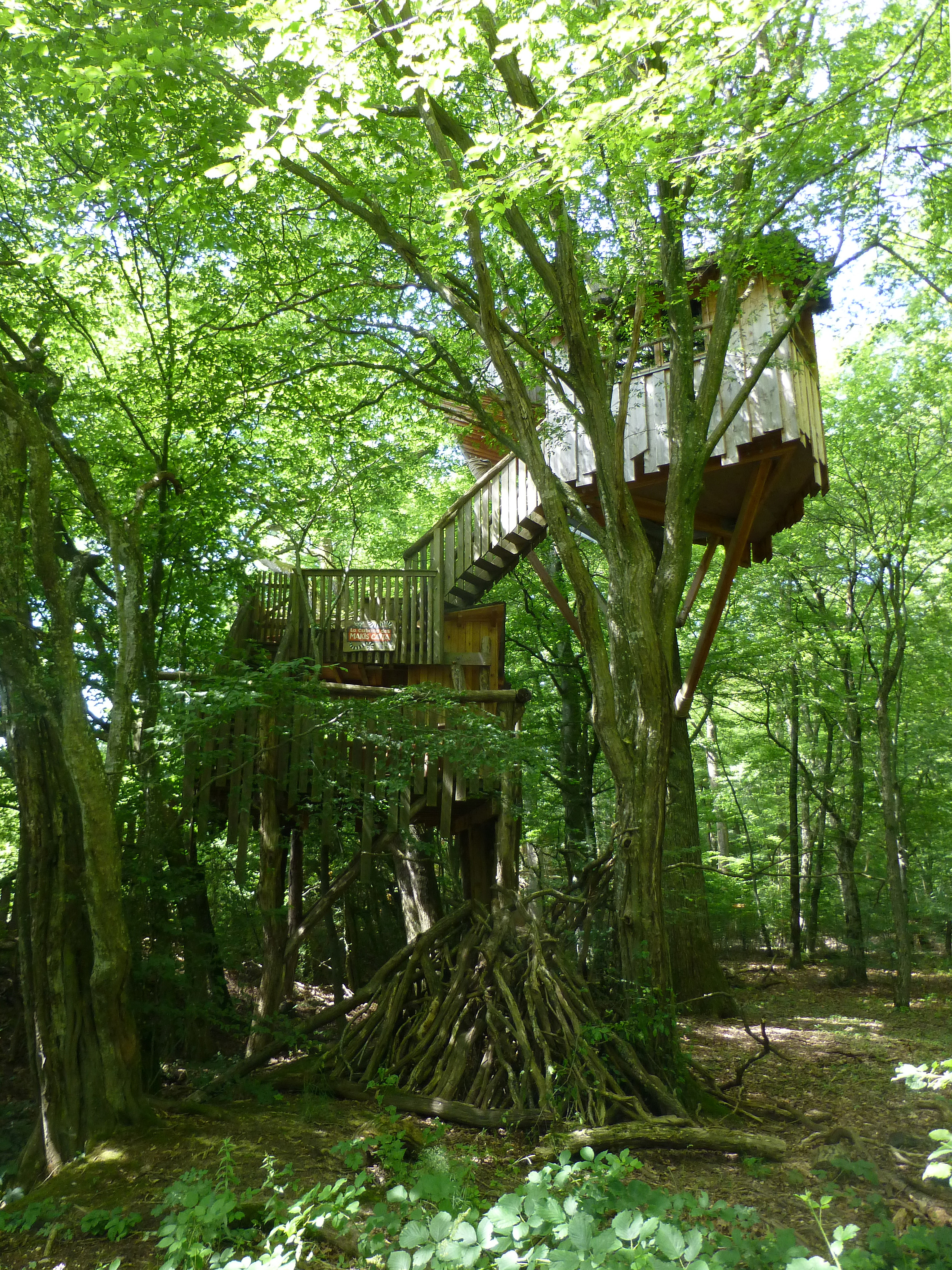 Cabane perchée ("hébergement insolite") au parc animalier de Sainte-Croix (Moselle).